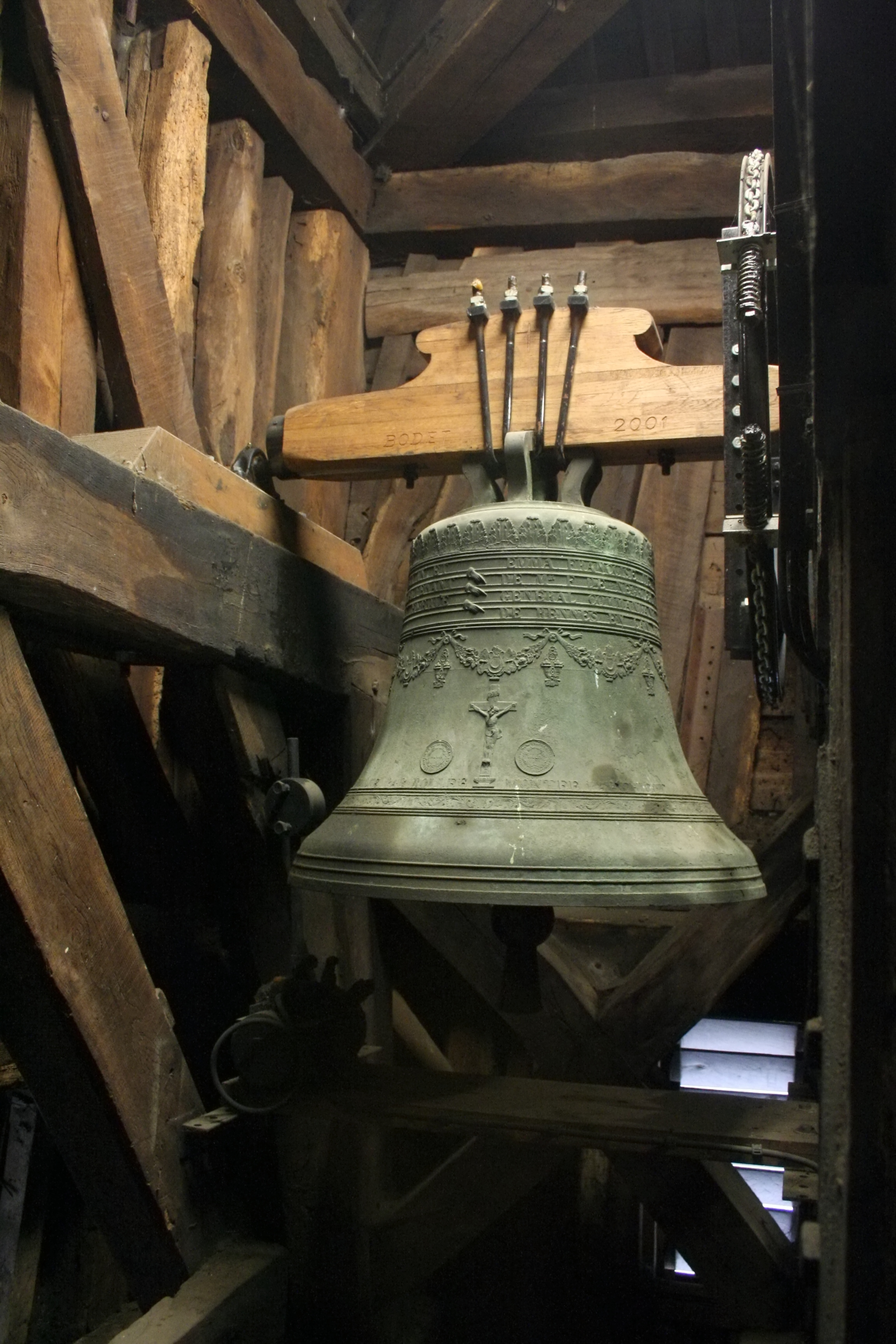 Une cloche de l'église Saint-Germain de Rennes.